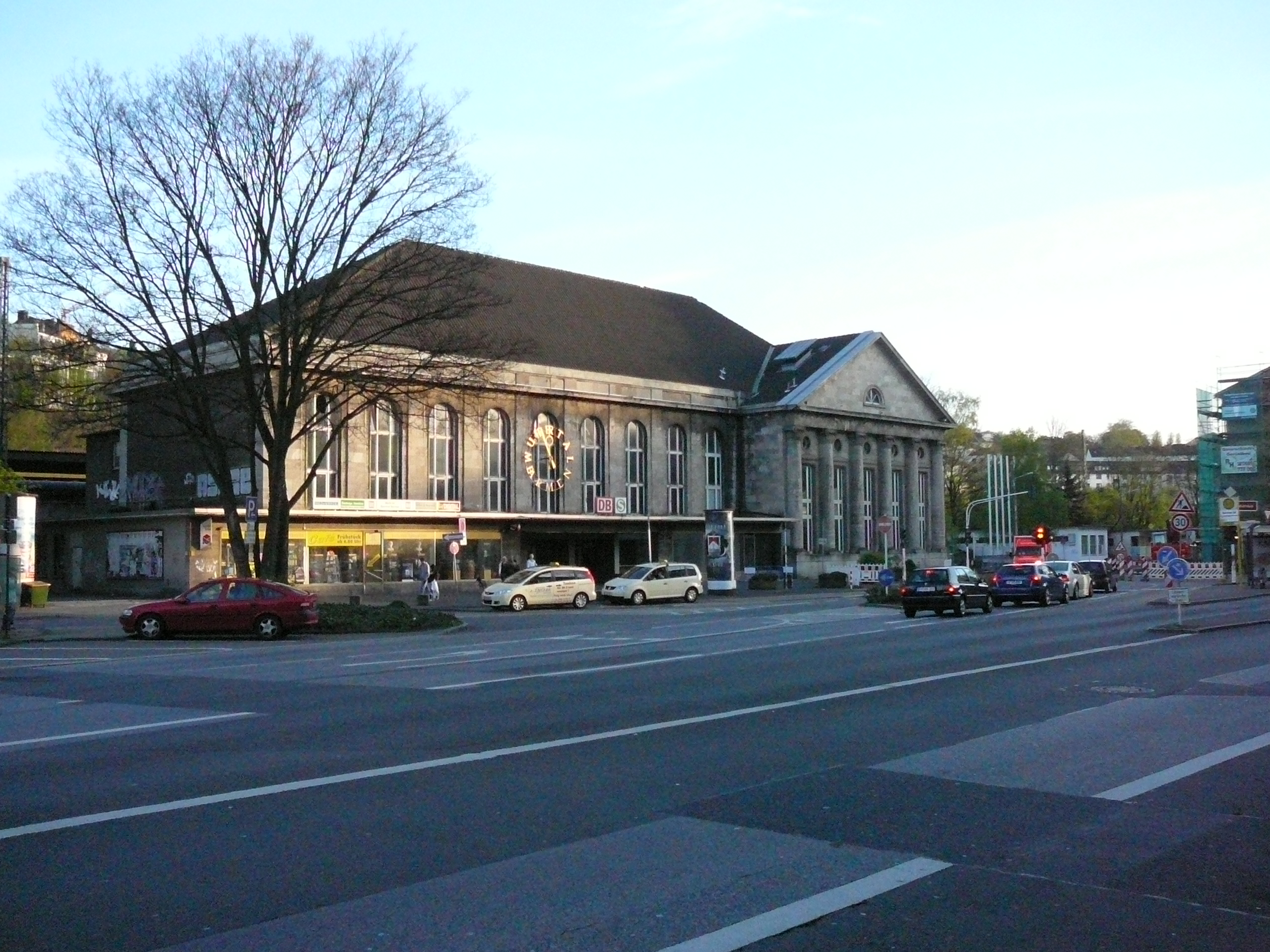 Winklerstraße, Wuppertal